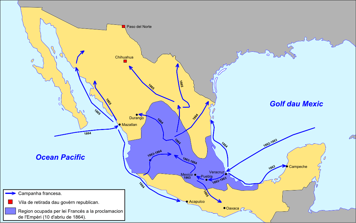 Esquèma generau de l'intervencion francesa en Mexic (1862-1867).